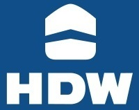 Логотип Howaldtswerke-Deutsche Werft